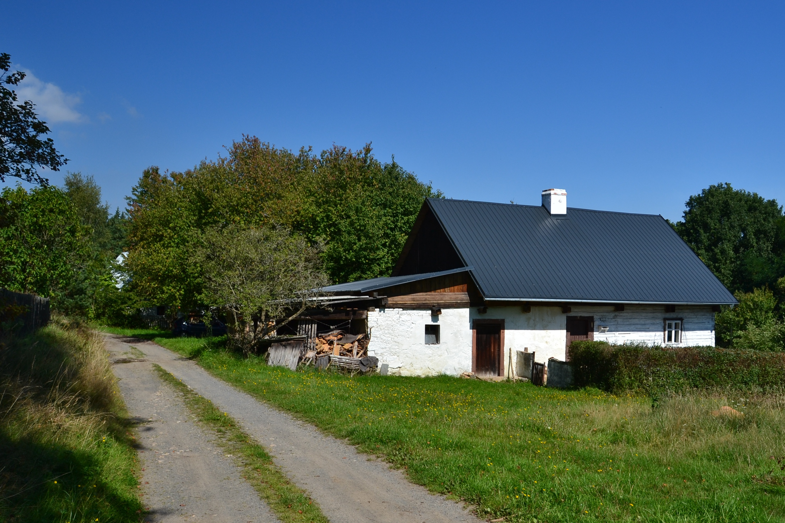 Radějov čp. 2